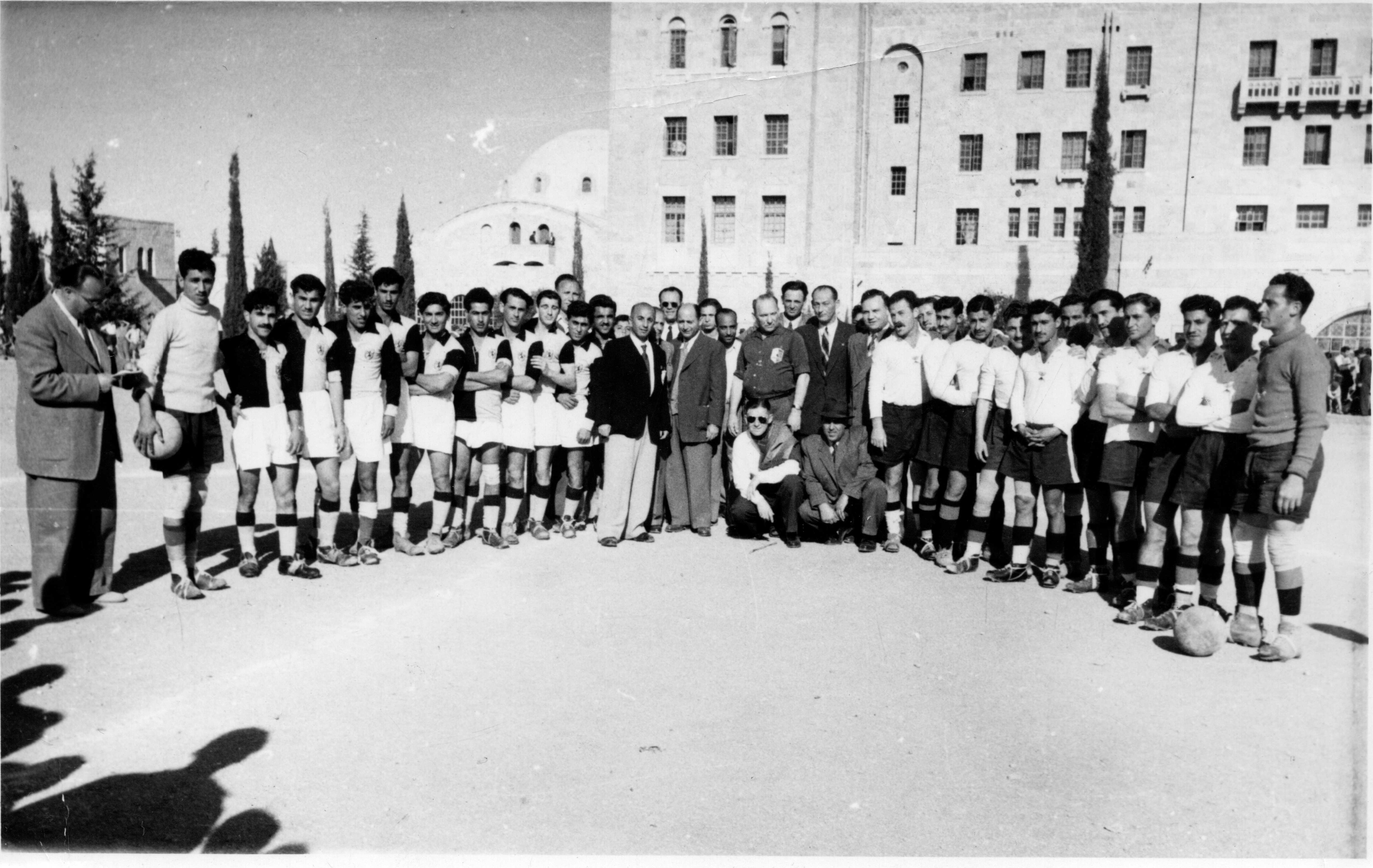 מכבי ירושלים (משמאל) דרבי מול בית"ר ירושלים (ימין) יום טורינו 1950